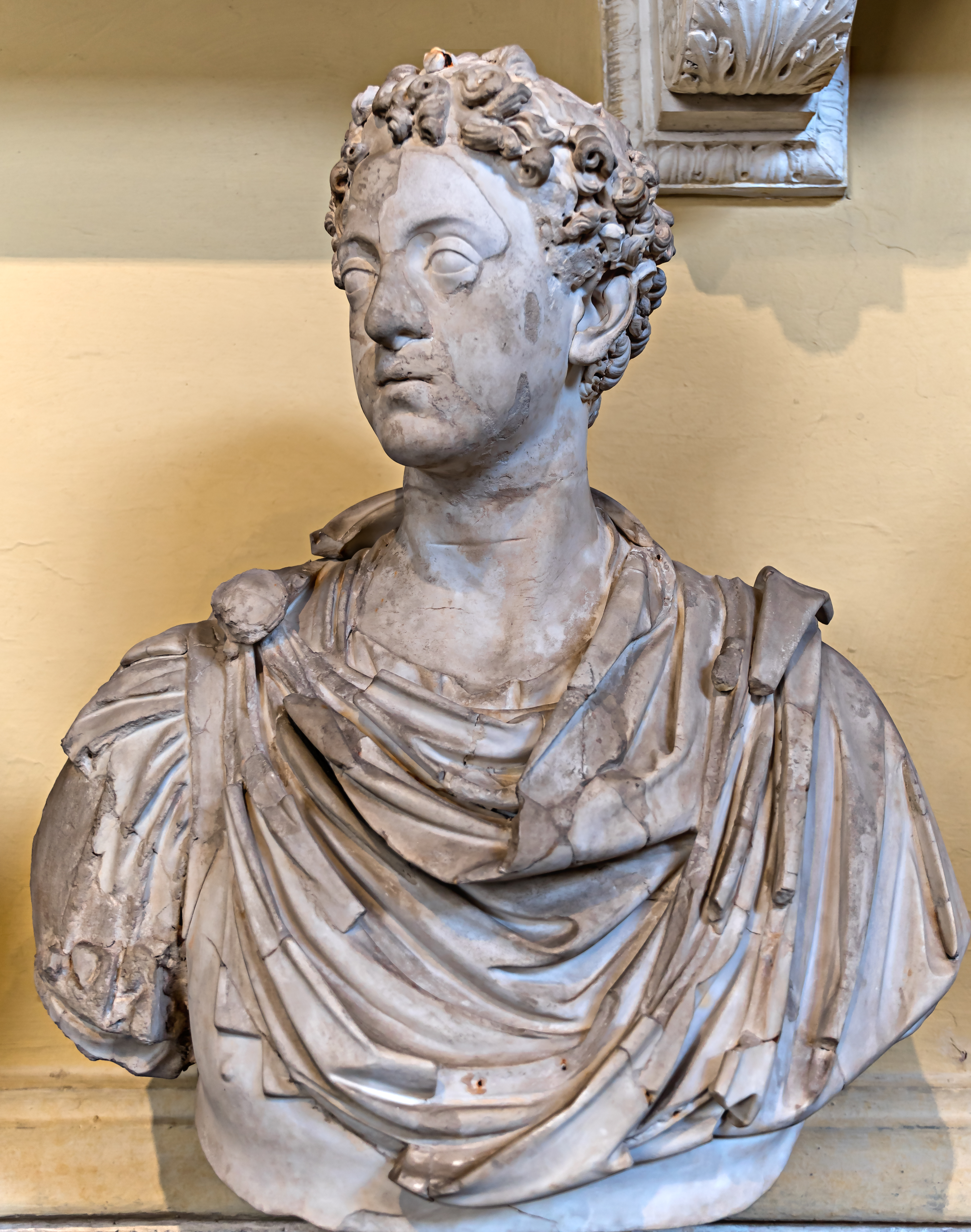 Porträt des jugendlichen Commodus (Vatikanische Museen)